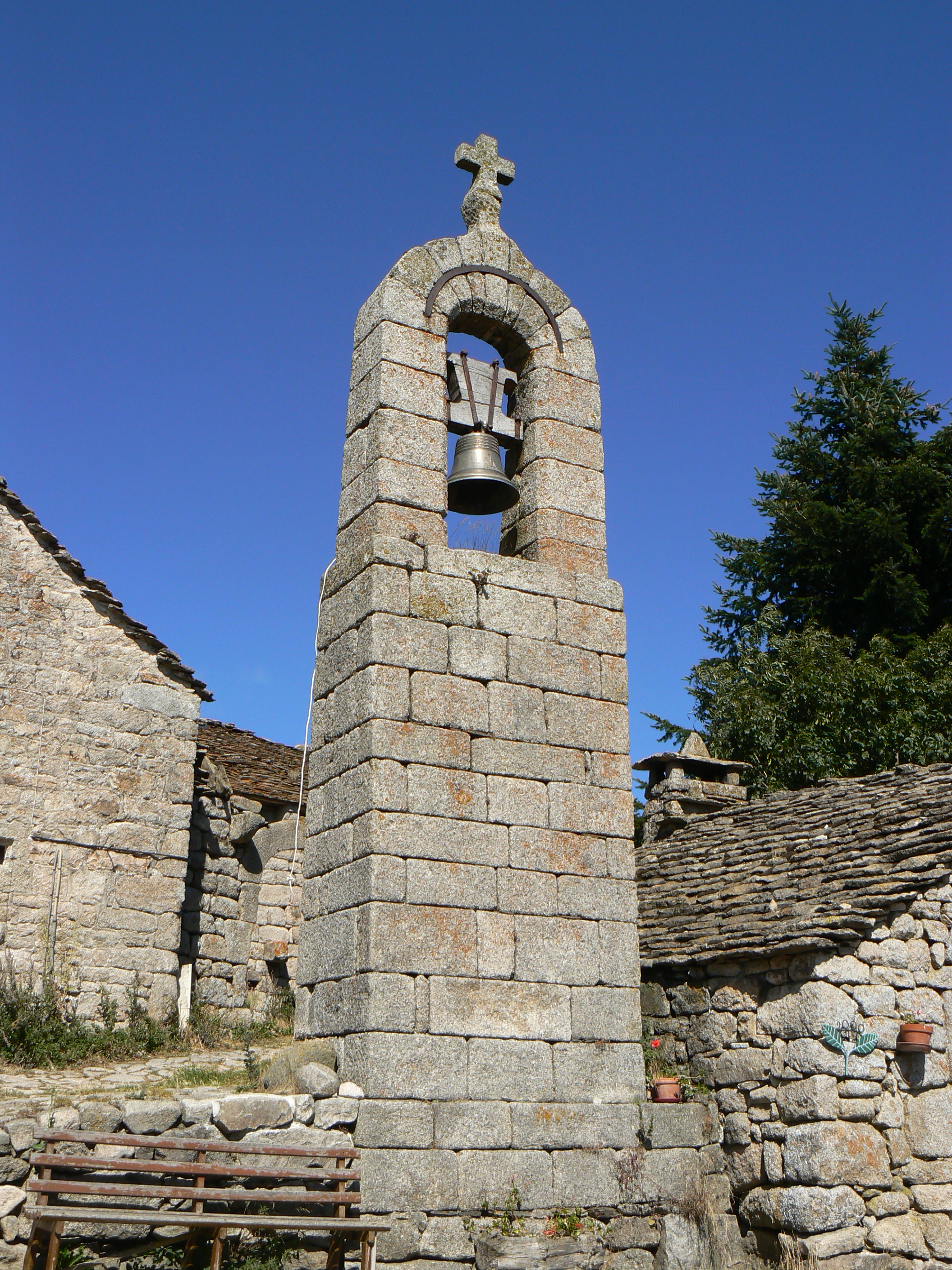 Clocher de tourmente du hameau de la Fage, commune de Saint-Étienne-du-Valdonnez, Lozère, France